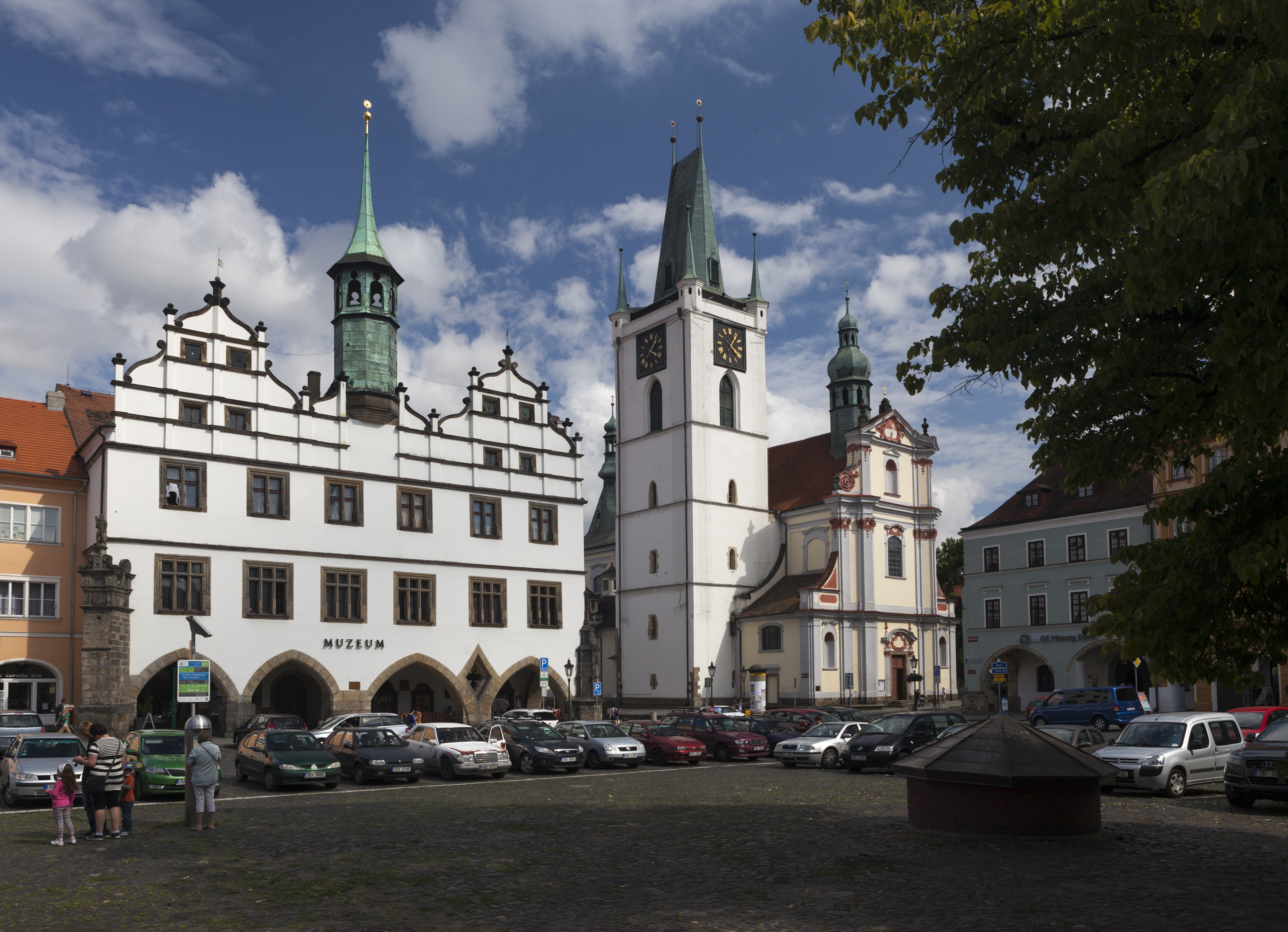 Stará radnice, Mírové náměstí 171/40, Litoměřice-Město, Litoměřice.